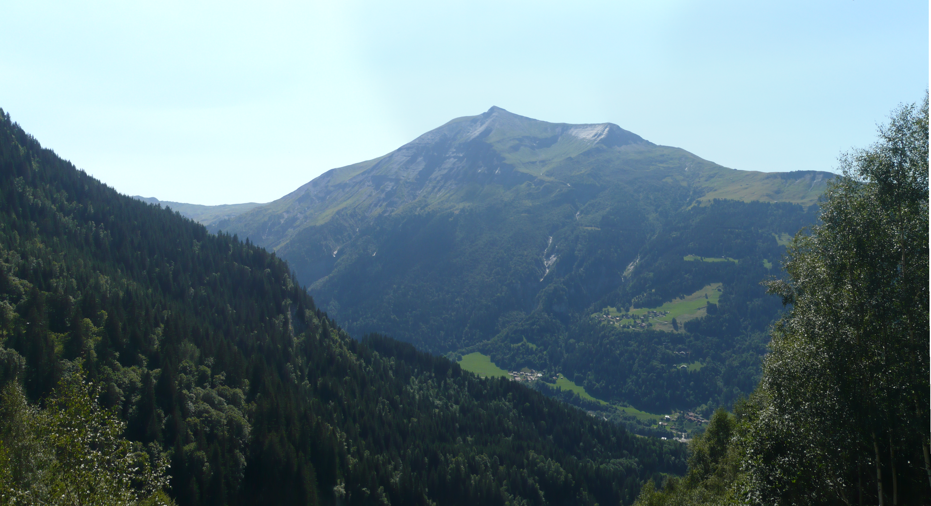 Le mont Joly vu depuis le chemin du Champel aux chalets du Miage.